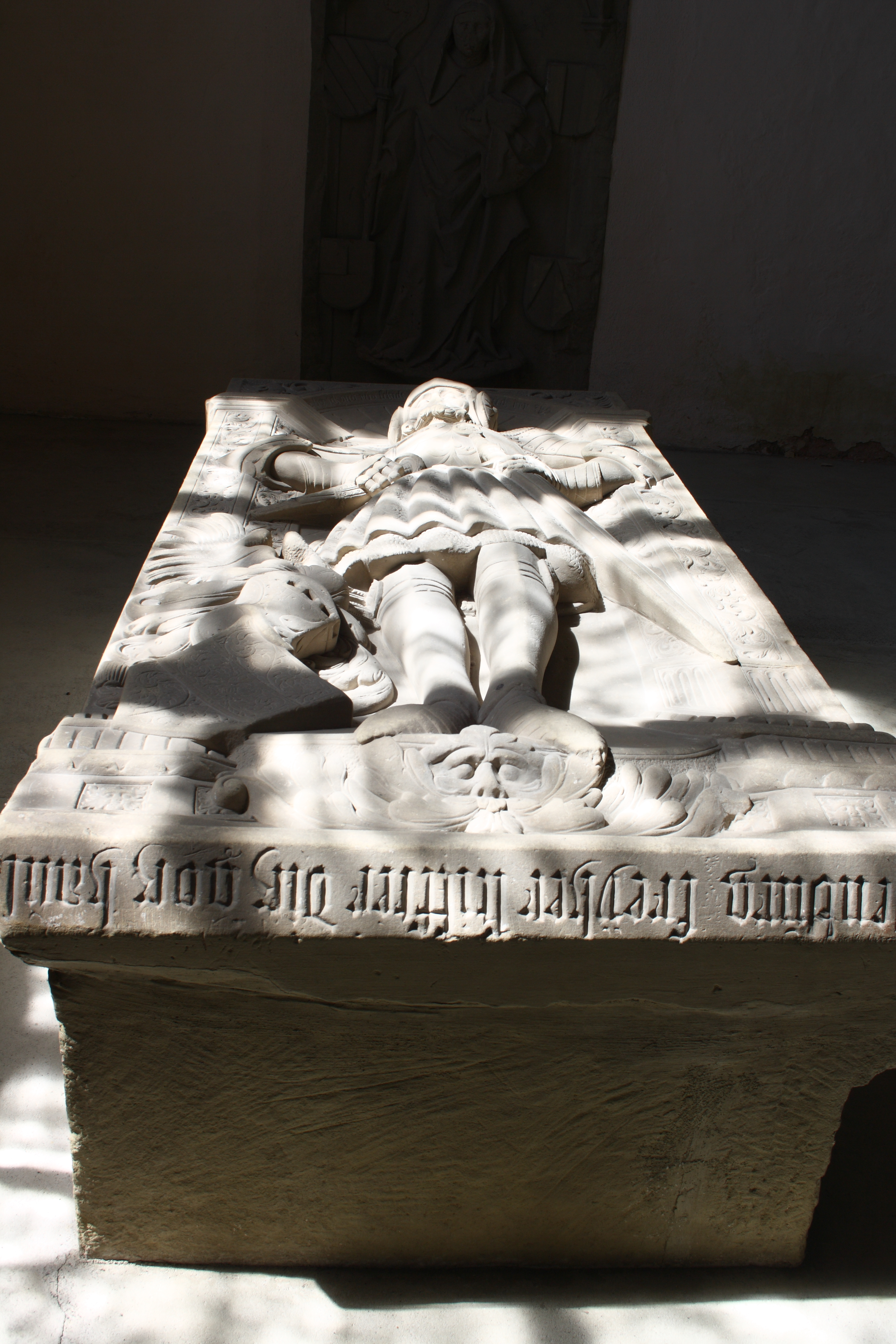 Evangelische Pfarrkirche, ehemalige Benediktinerklosterkirche St. Maria in Auhausen im Landkreis Donau-Ries (Bayern), romanische Tumba mit Epitaph von 1542 für Hartmann von Lobdeburg († 958), den angeblichen Stifter der Abtei Auhausen